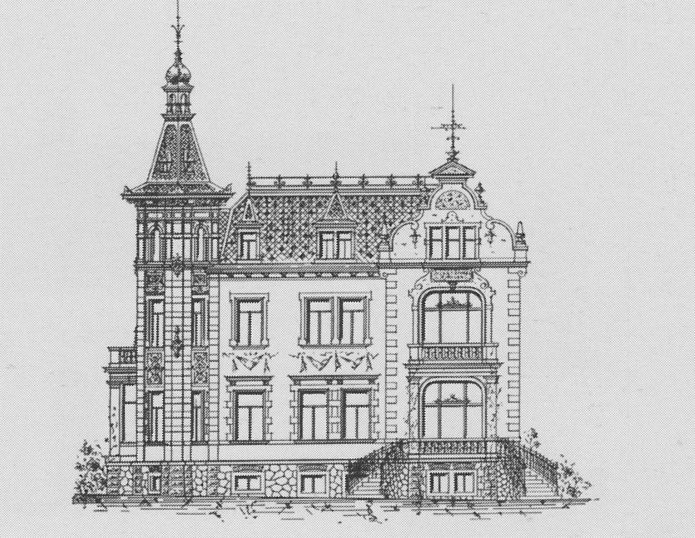 Radebeul, Wasastr 68, Bauzeichnung um 1898